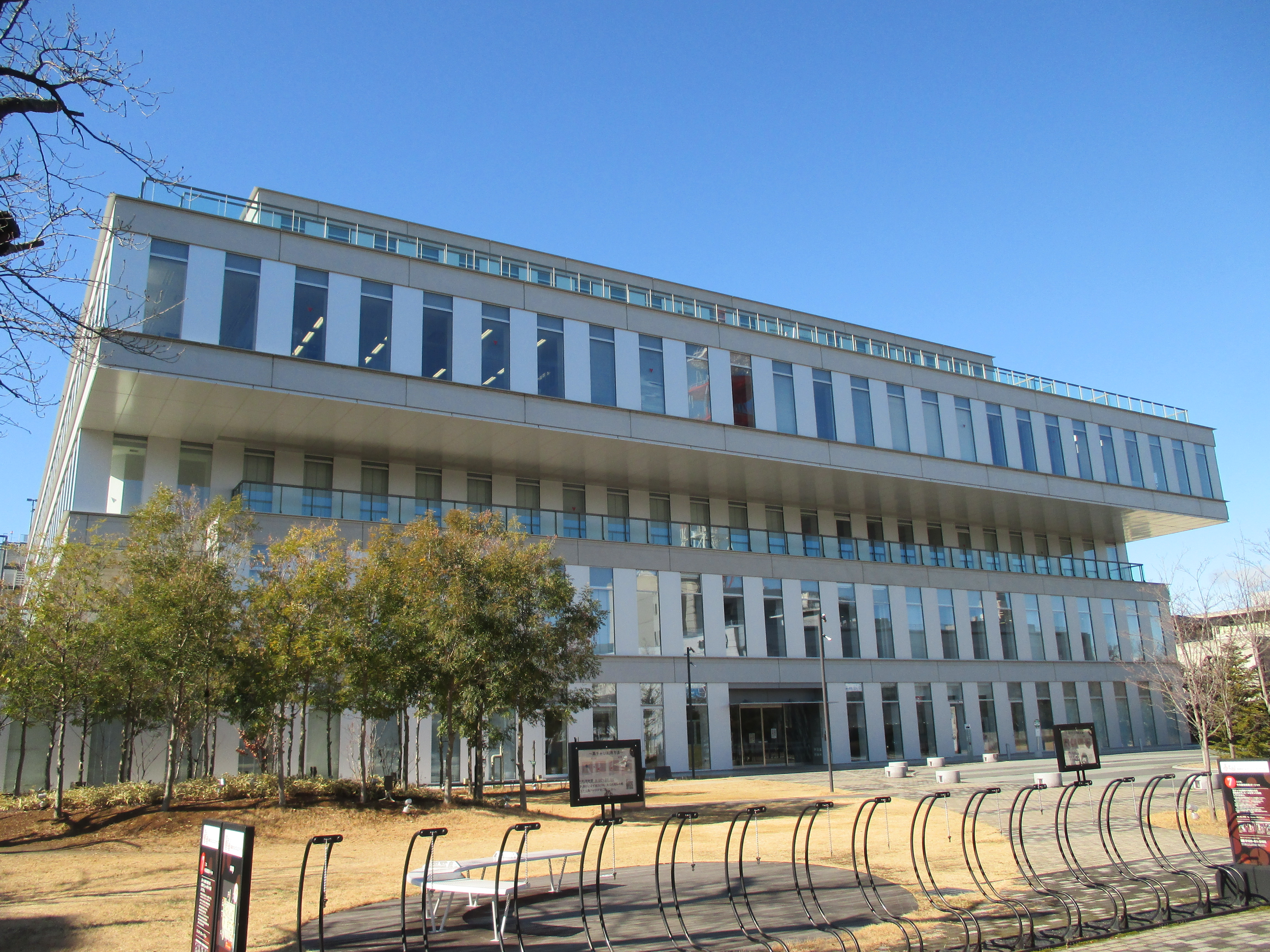 高崎市総合保健センター/高崎市立中央図書館の外観正面